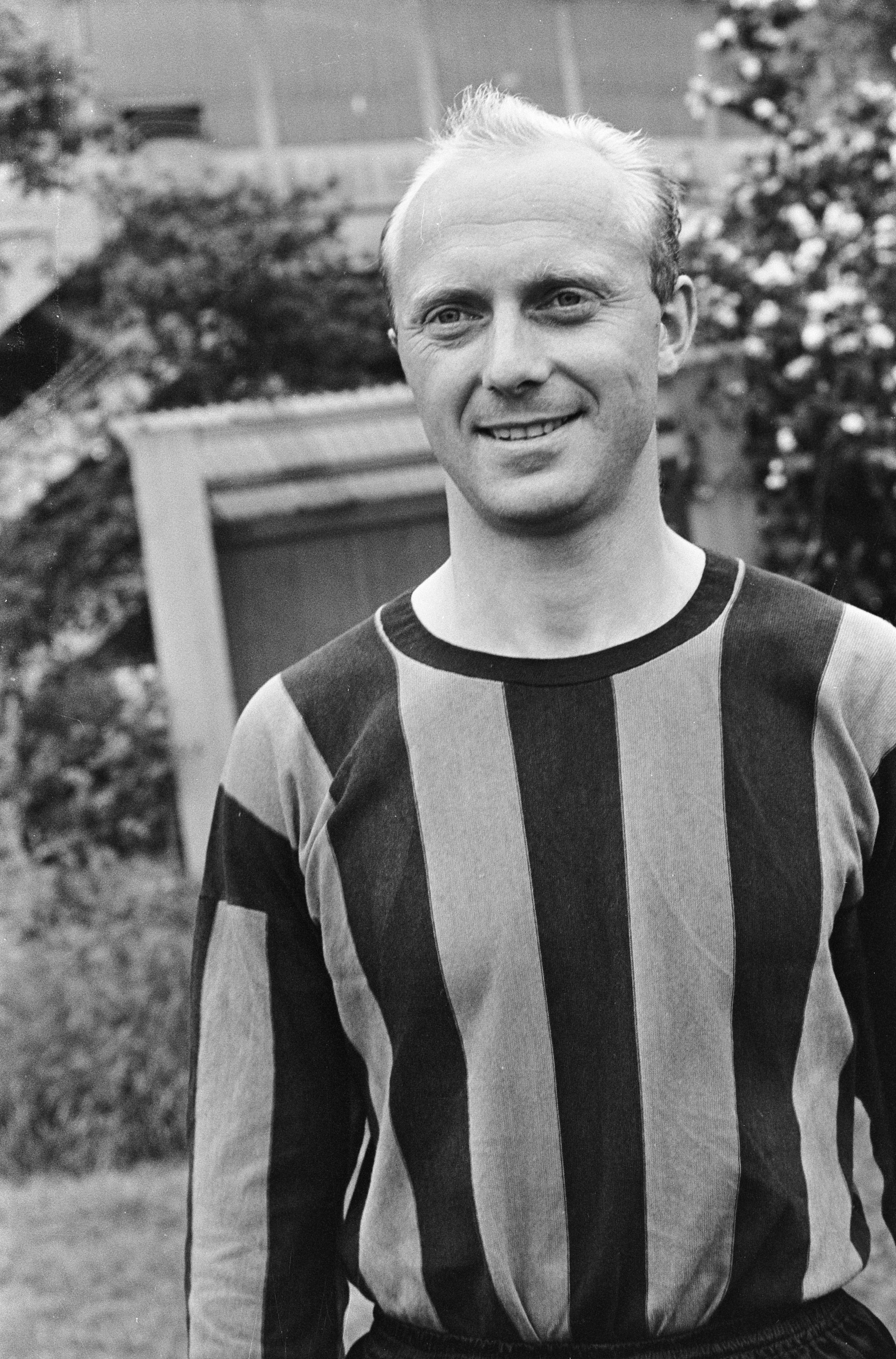 Collectie / Archief : Fotocollectie Anefo Reportage / Serie : [ onbekend ] Beschrijving : Piet Kruiver bij DWS, Kruiver in DWS-tenue Datum : 25 juni 1966 Locatie : Amsterdam Trefwoorden : voetballers Persoonsnaam : Kruiver, Piet Fotograaf : Nijs, Jac. de / Anefo, [onbekend] Auteursrechthebbende : Nationaal Archief Materiaalsoort : Negatief (zwart/wit) Nummer archiefinventaris : bekijk toegang 2.24.01.05 Bestanddeelnummer : 919-2866